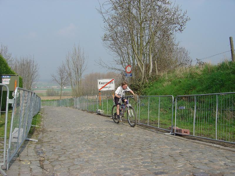 de Oude Kwaremont